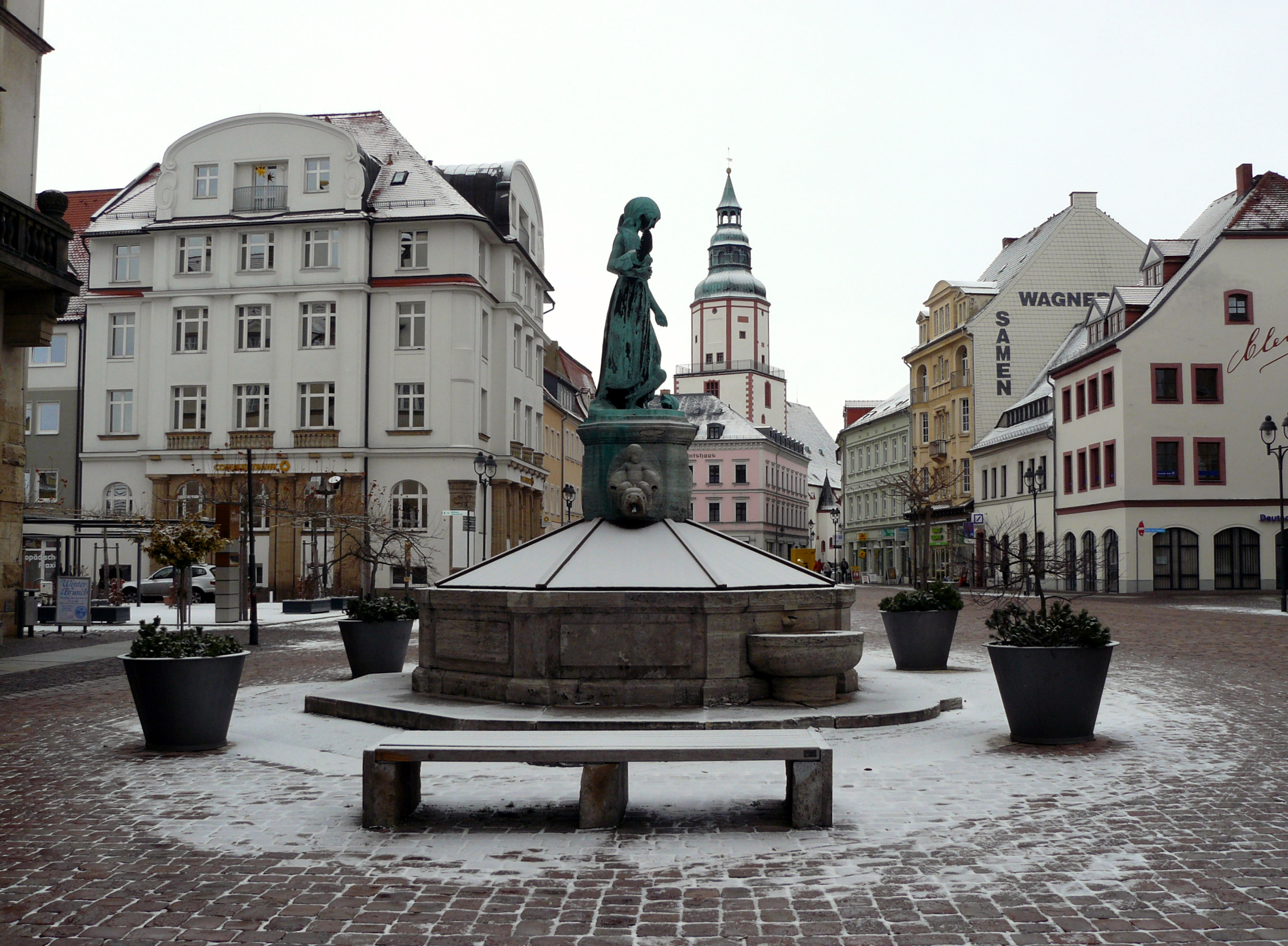 Schlegelbrunnen in Döbeln, im Hintergrund St.-Nicolai-Kirche